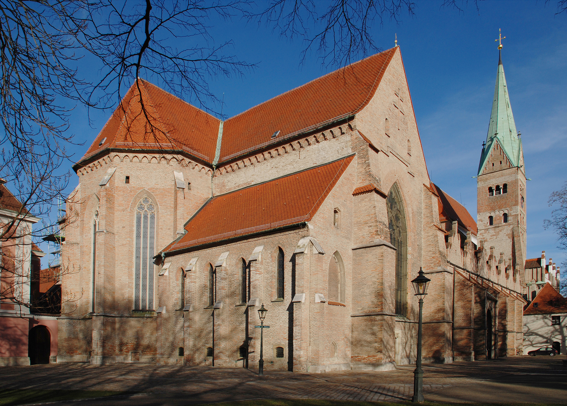 Der Westchor ist im 11Jh.erbaut woden. Die älteste Urkunde geht auf das Jahr 822 zurück.